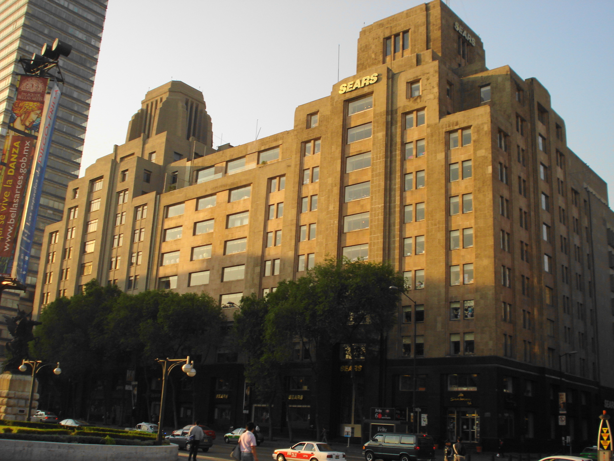 Edificios La Nacional en Avenida Juárez, Ciudad de México